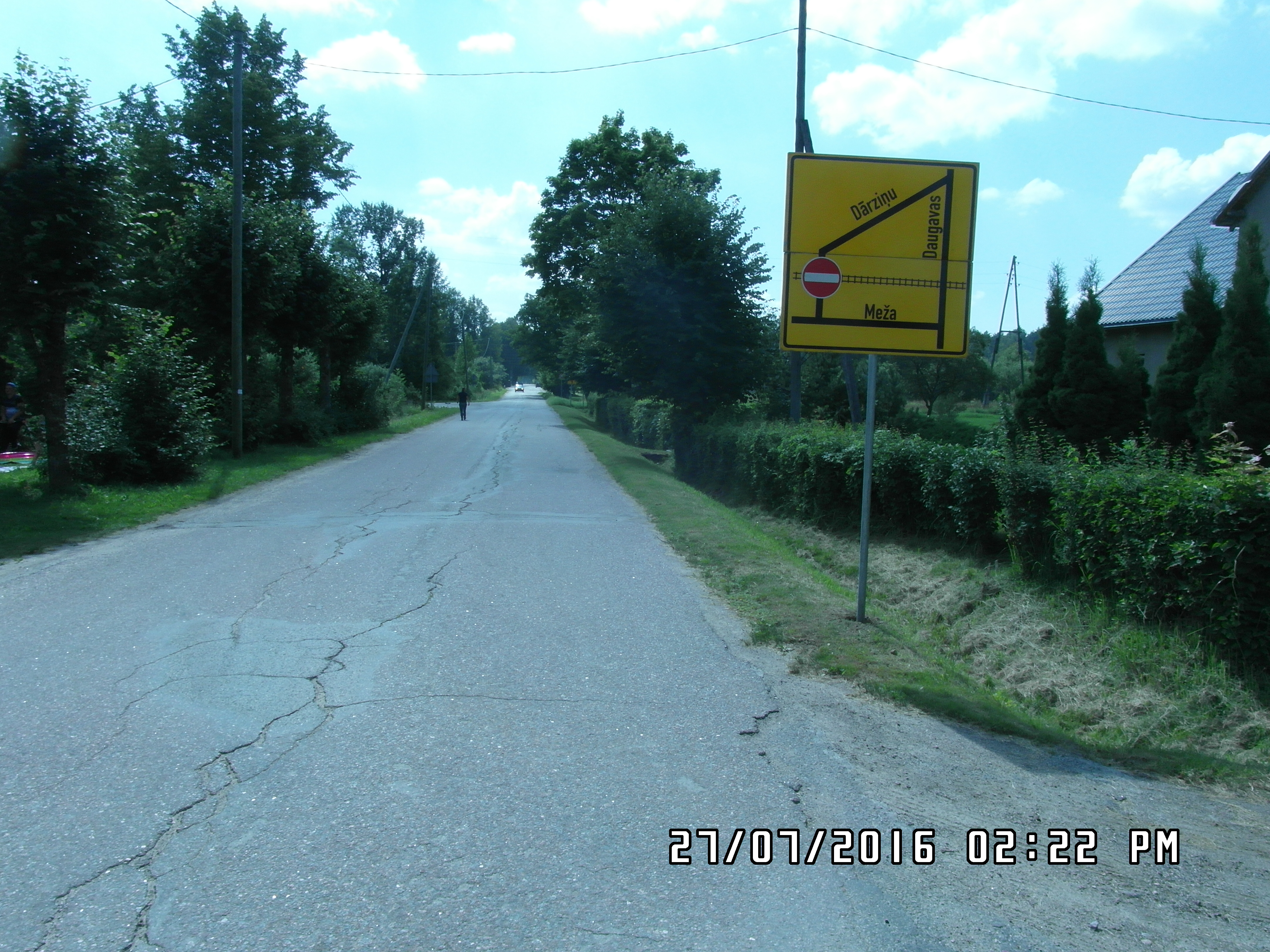 Īslaicīgi slēgtas pārbrauktuves uz remontdarbu laiku apbraucamā ceļa zīme